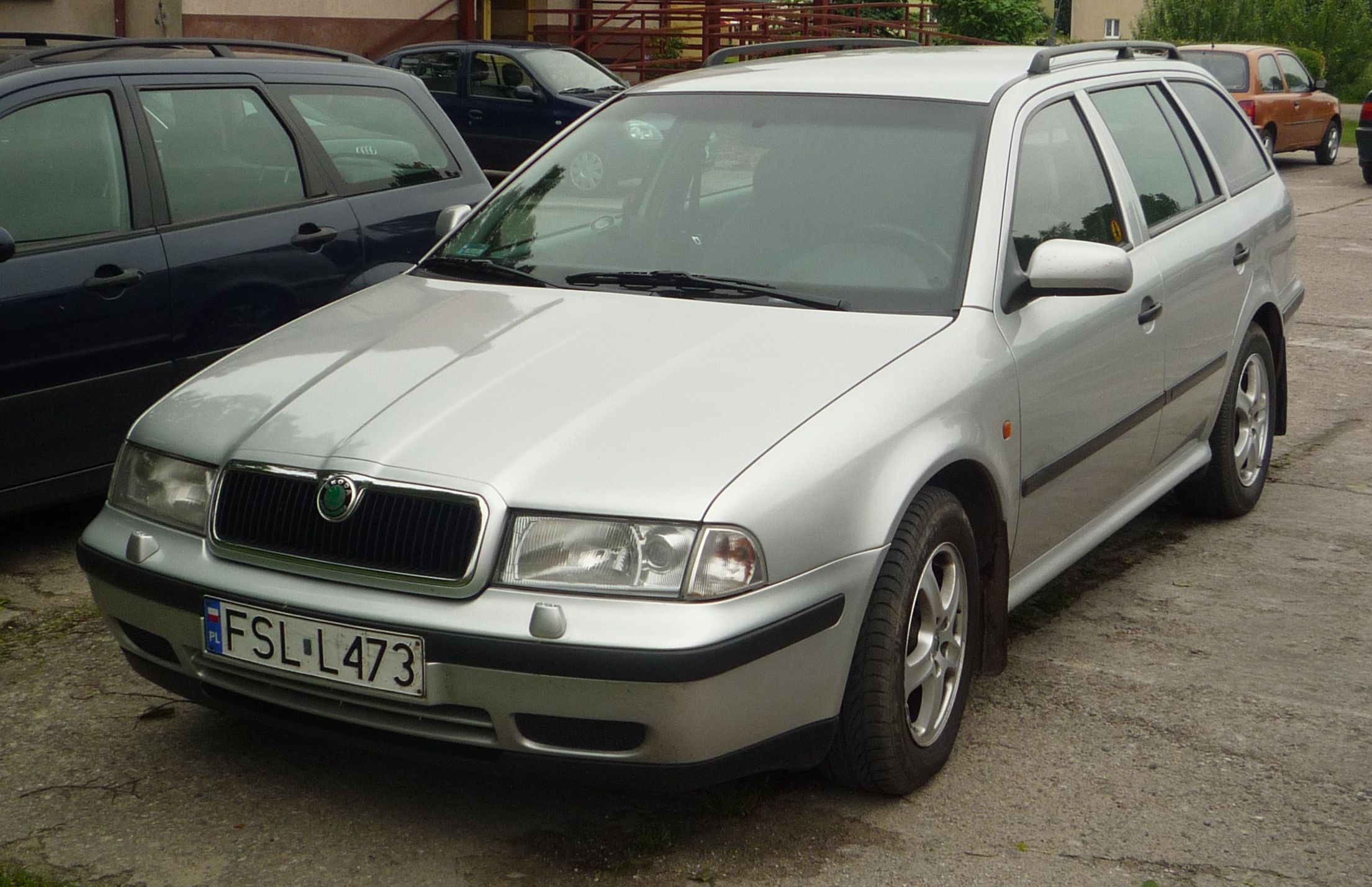 Škoda Octavia I w Słubicach.